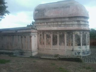 भारताच्या तेर जिल्हा उस्मानाबाद येथील त्रिविक्रम मंदिर.